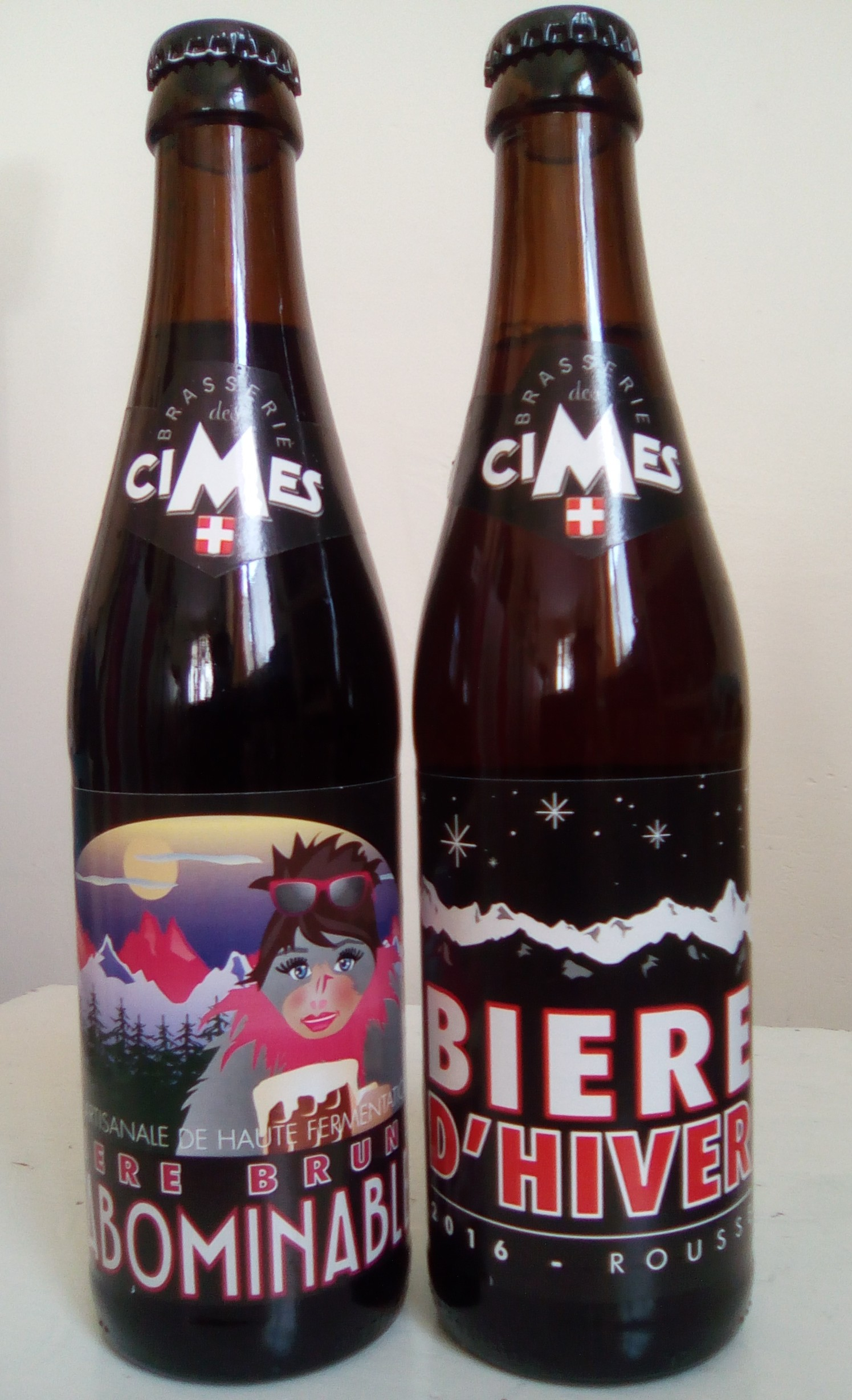 Bouteille de la bière savoyarde "Brasserie des Cîmes"